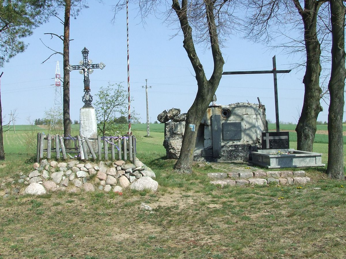 Strękowa Góra, pomnik bitwy pod Wizną 1939